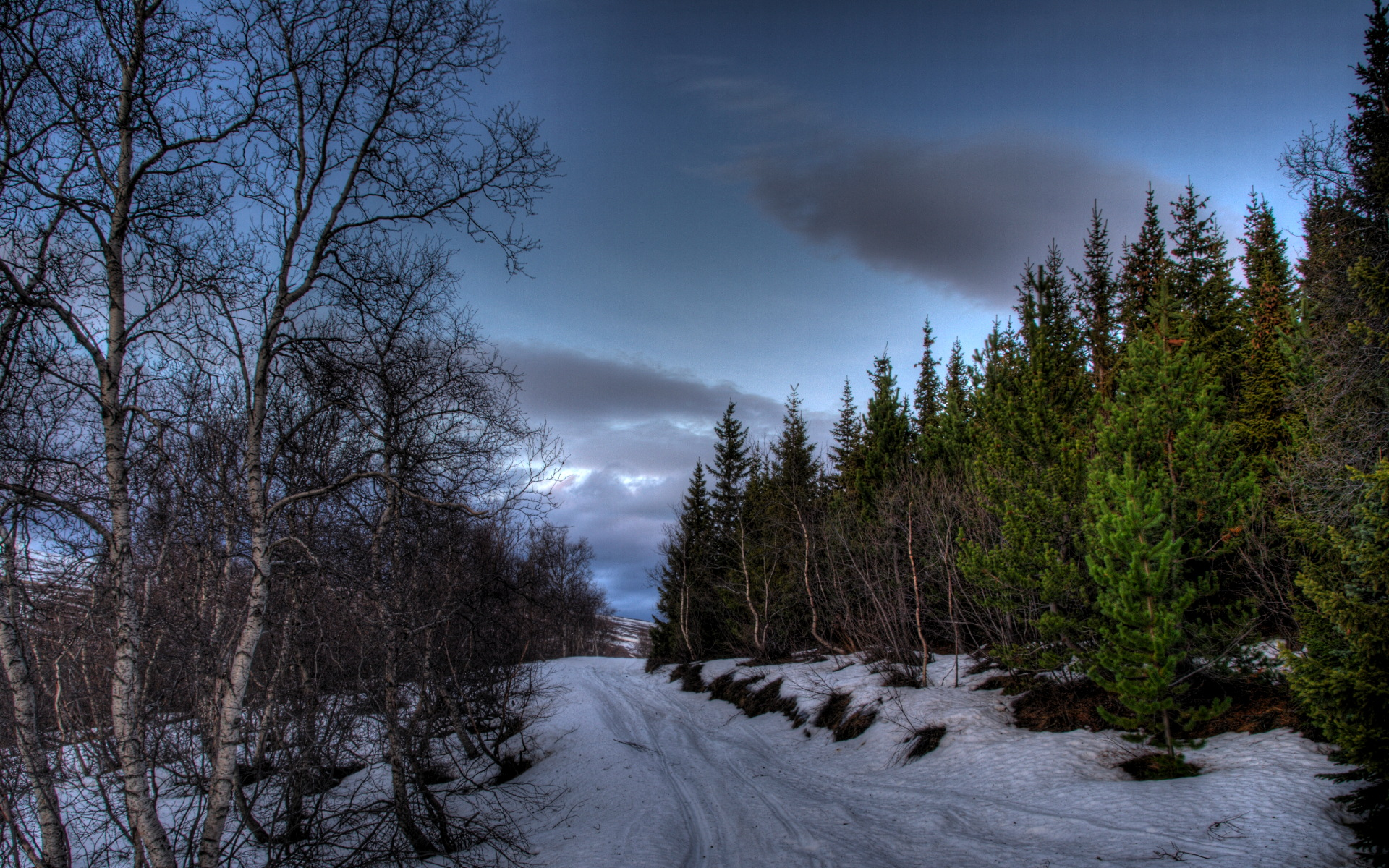 Vaglaskógur